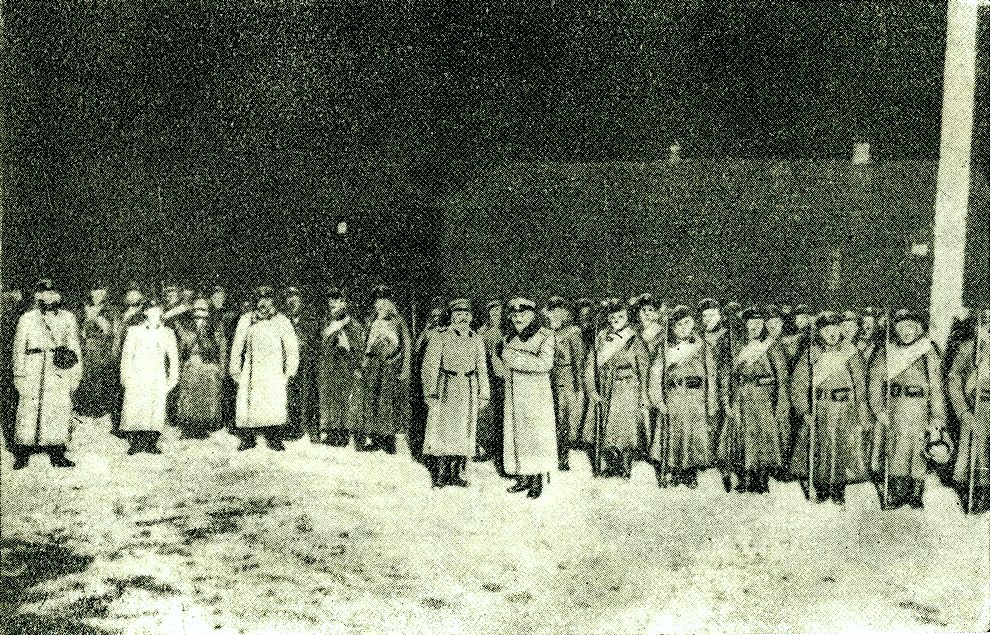 Солдаты у Нарвских ворот утром 9 января 1905 года. Фотография.